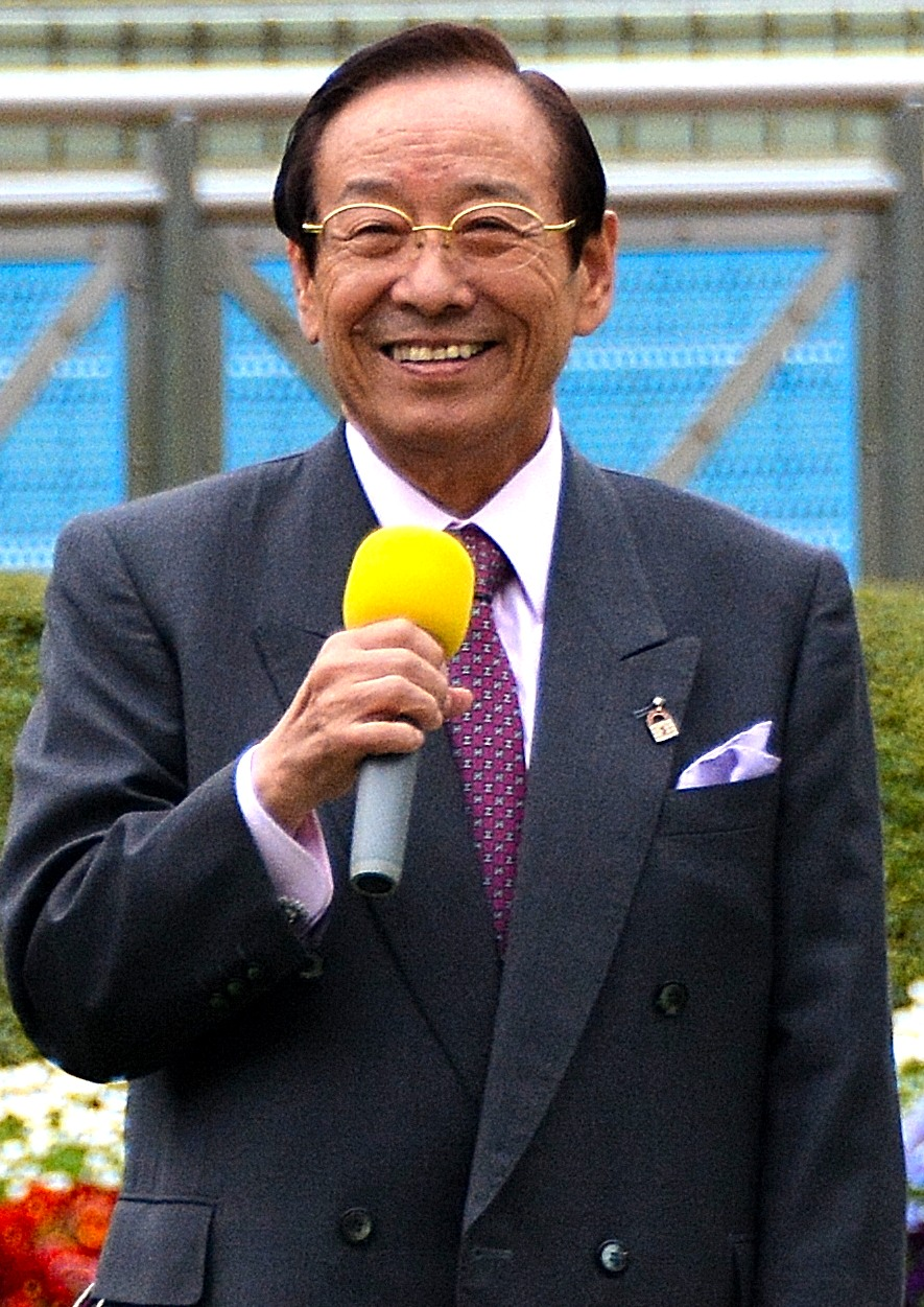 2014年4月19日（土）に中山競馬場で最終競走が終わった後のパドックで、トークライヴに出席した増沢末夫氏を、観客席から撮影したもの。